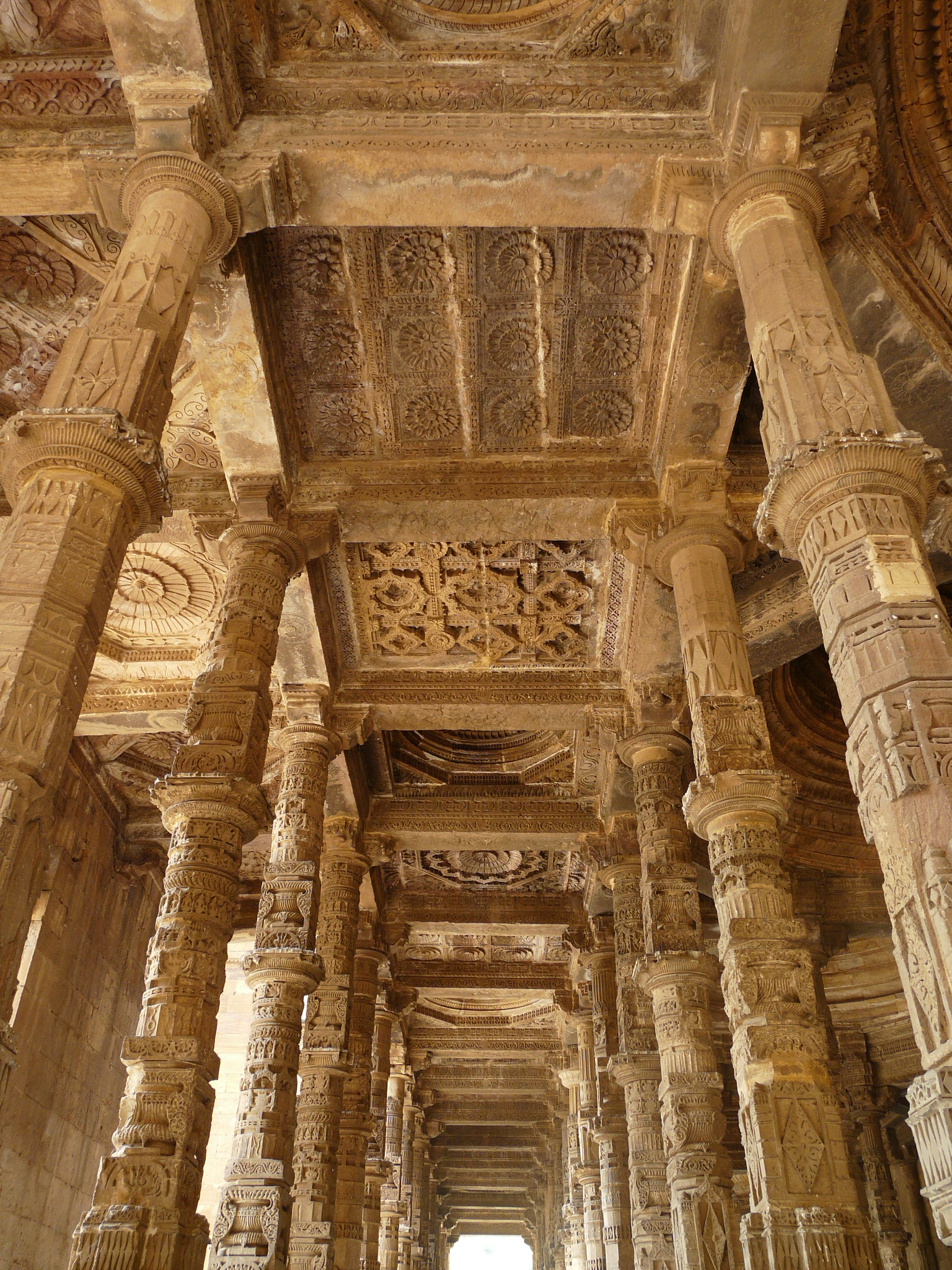 Arcade and ceiling detail Adhai Din-ka-Jhonpra, Ajmer, Rajasthan, India